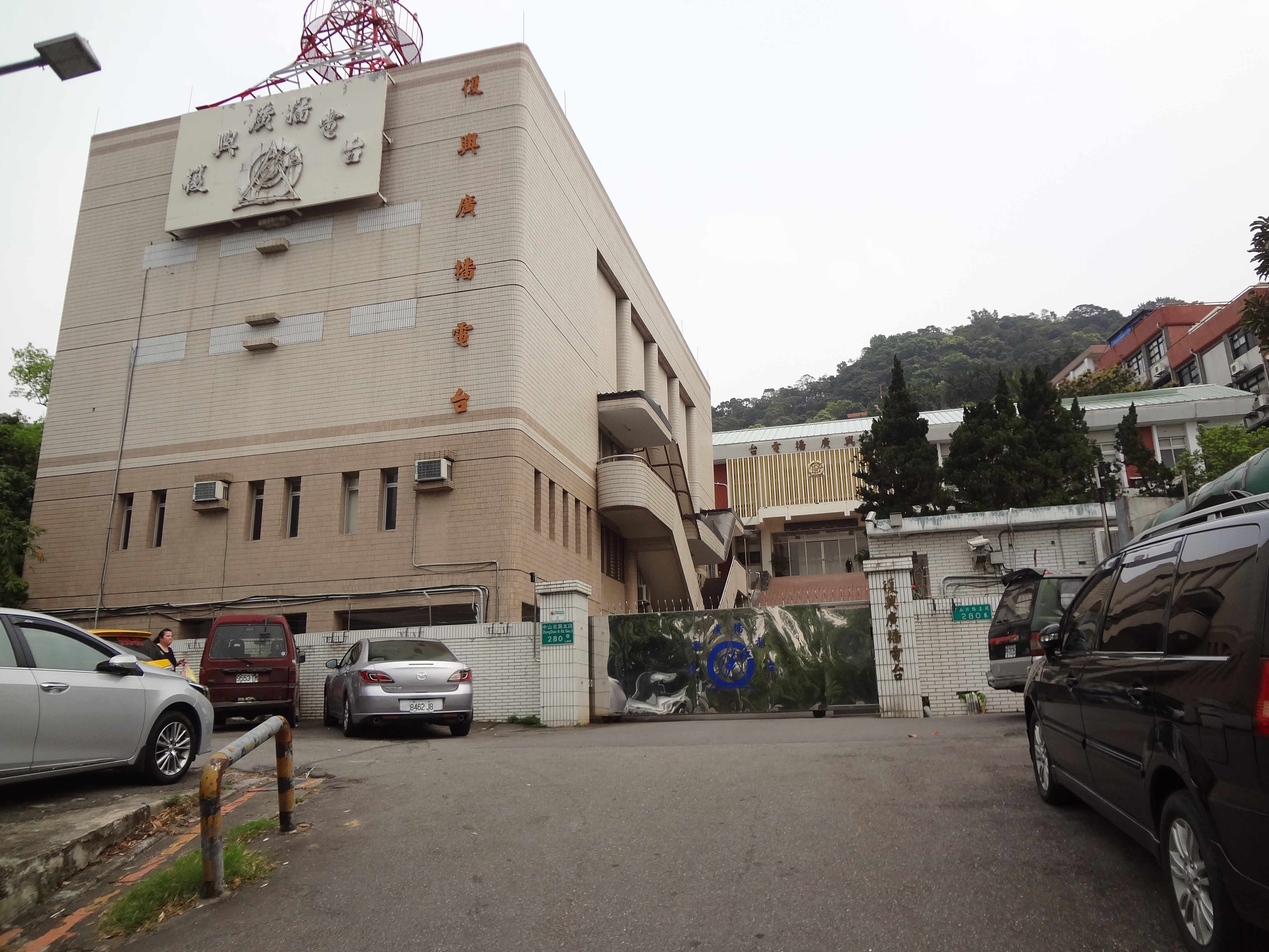 復興廣播電臺總臺，位於臺北市士林區中山北路五段280巷5號。